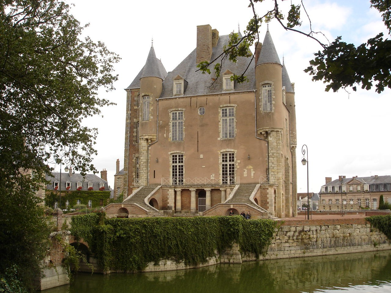 Vue arrière du donjon du château de Bellegarde (Loiret)